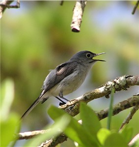 blauwgrijze muggenvanger (Polioptila caerulea) eigen foto Categorie:Afbeelding vogel